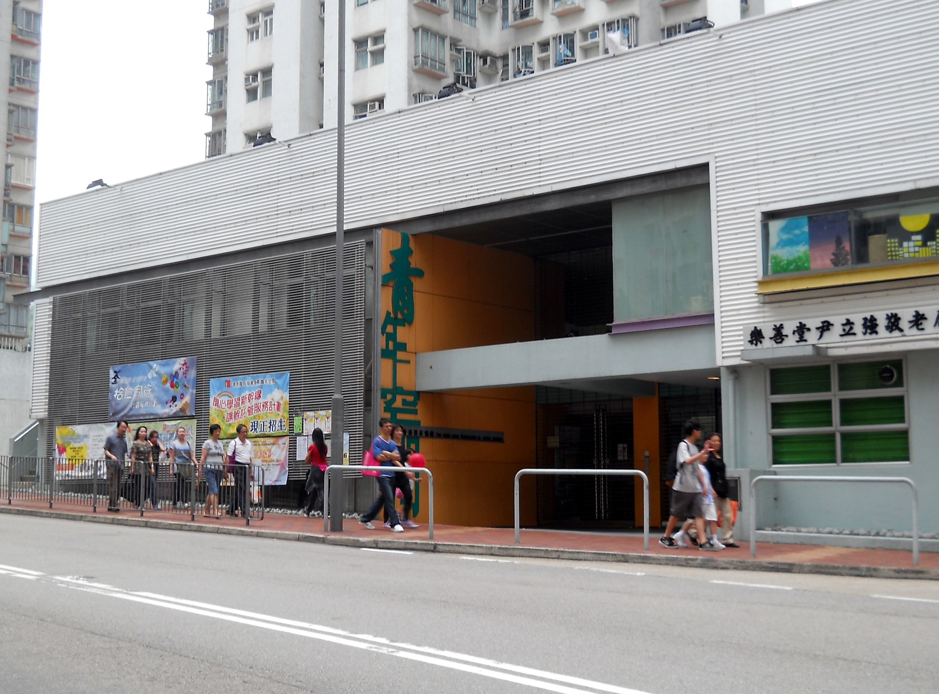 中文（香港）: 香港青年協會荃景青年空間